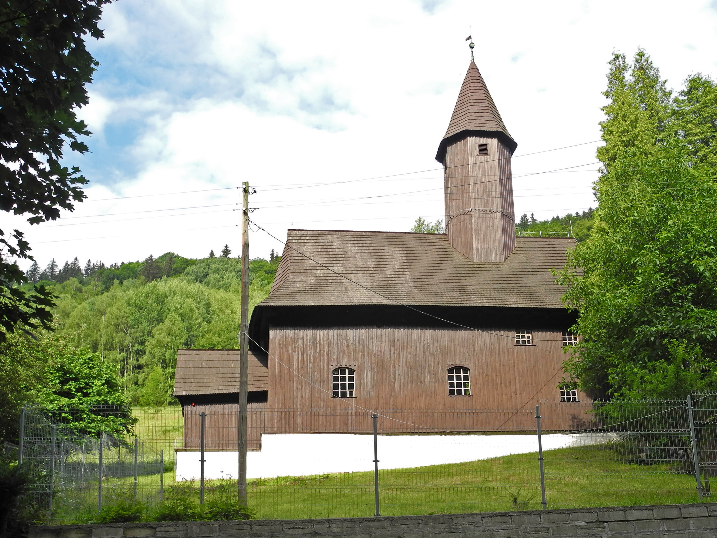 Holzkirche St. Anna in Spätenwalde (Zalesie), OT von Habelschwerdt (Bystrzyca Kłodzka)